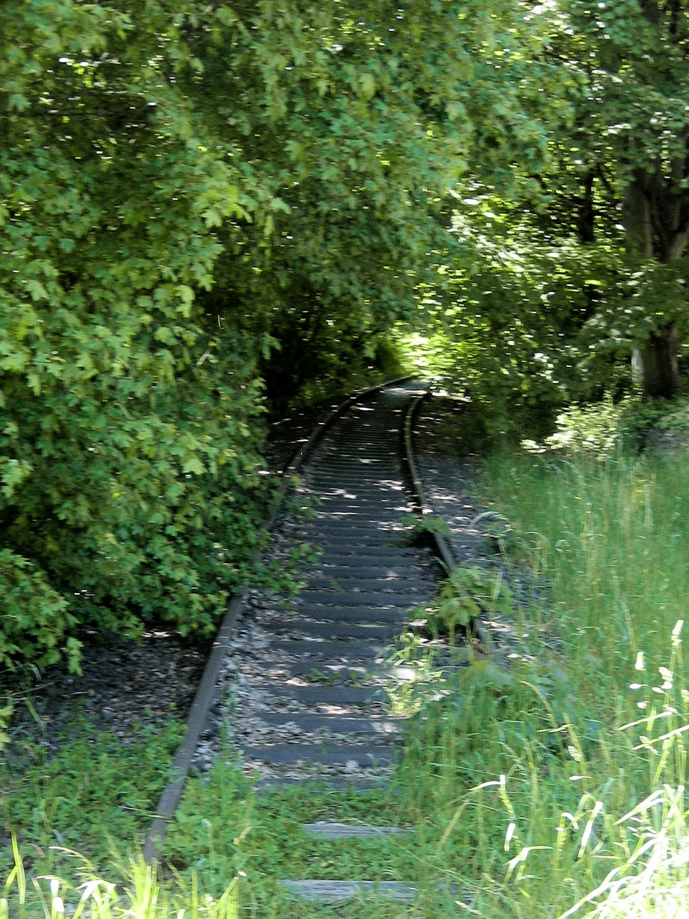 Stillgelegte Bachbahn innerhalb von Erfenbach